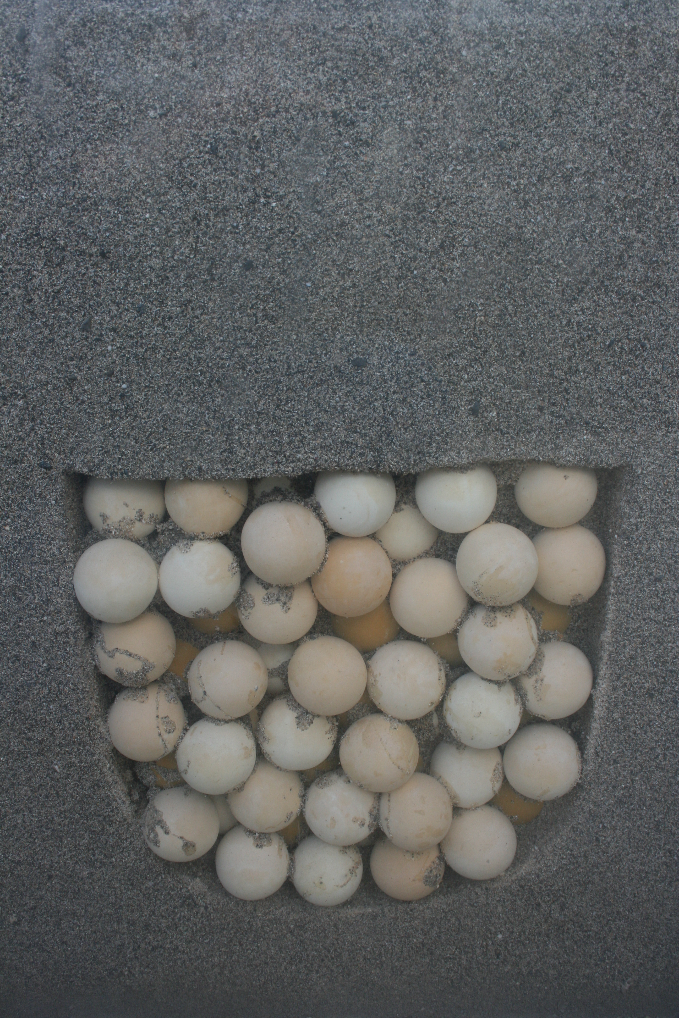 Coupe d'un nid de tortue marine reconstitué, à Category:Kélonia